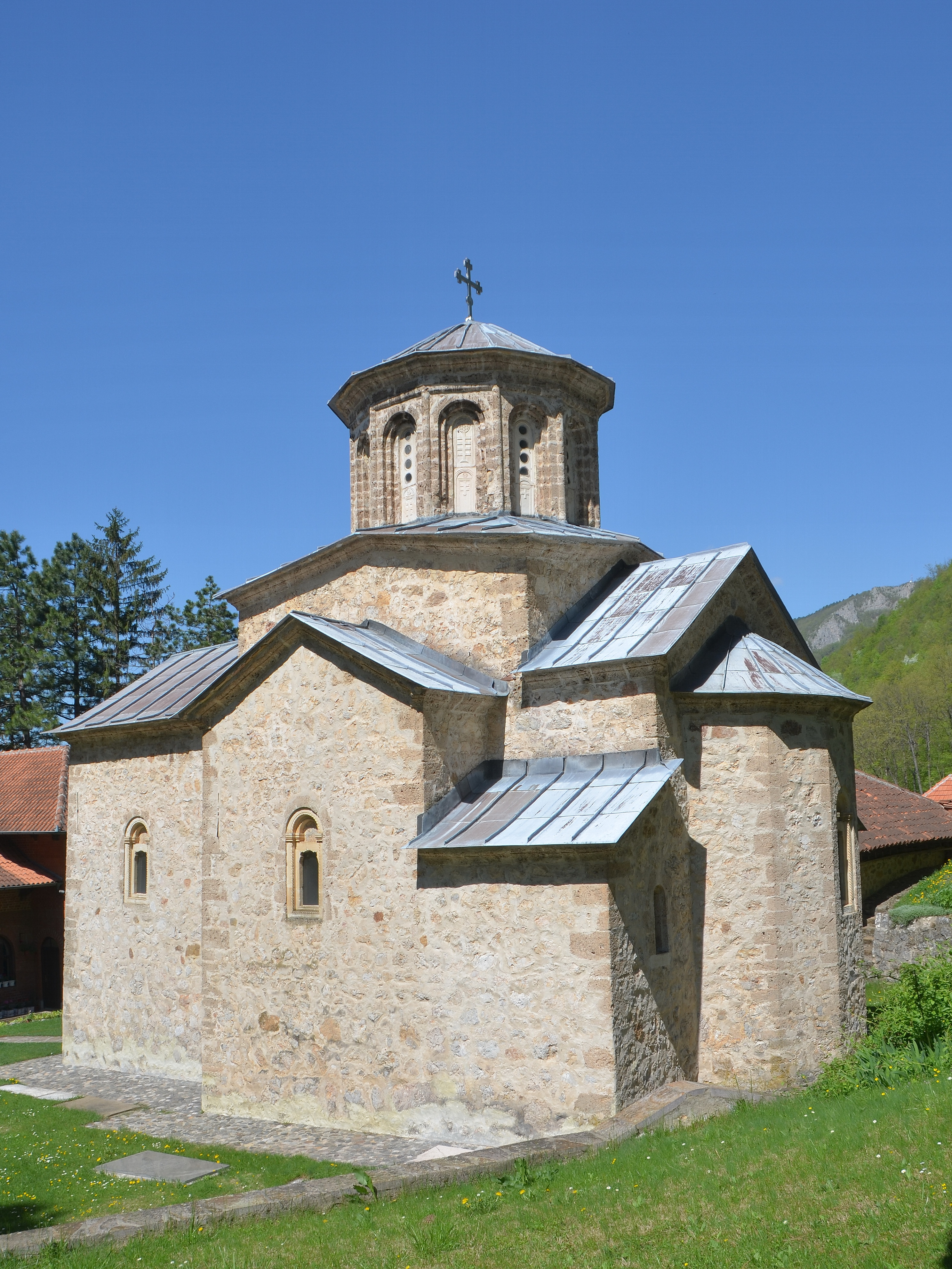 Манастир Свете Тројице (Овчарски) се налази на падинама планине Овчар, у атару села Дучаловићи, на територији општине Лучани. Припада Епархији жичкој Српске православне цркве и представља непокретно културно добро као споменик културе од великог значаја.